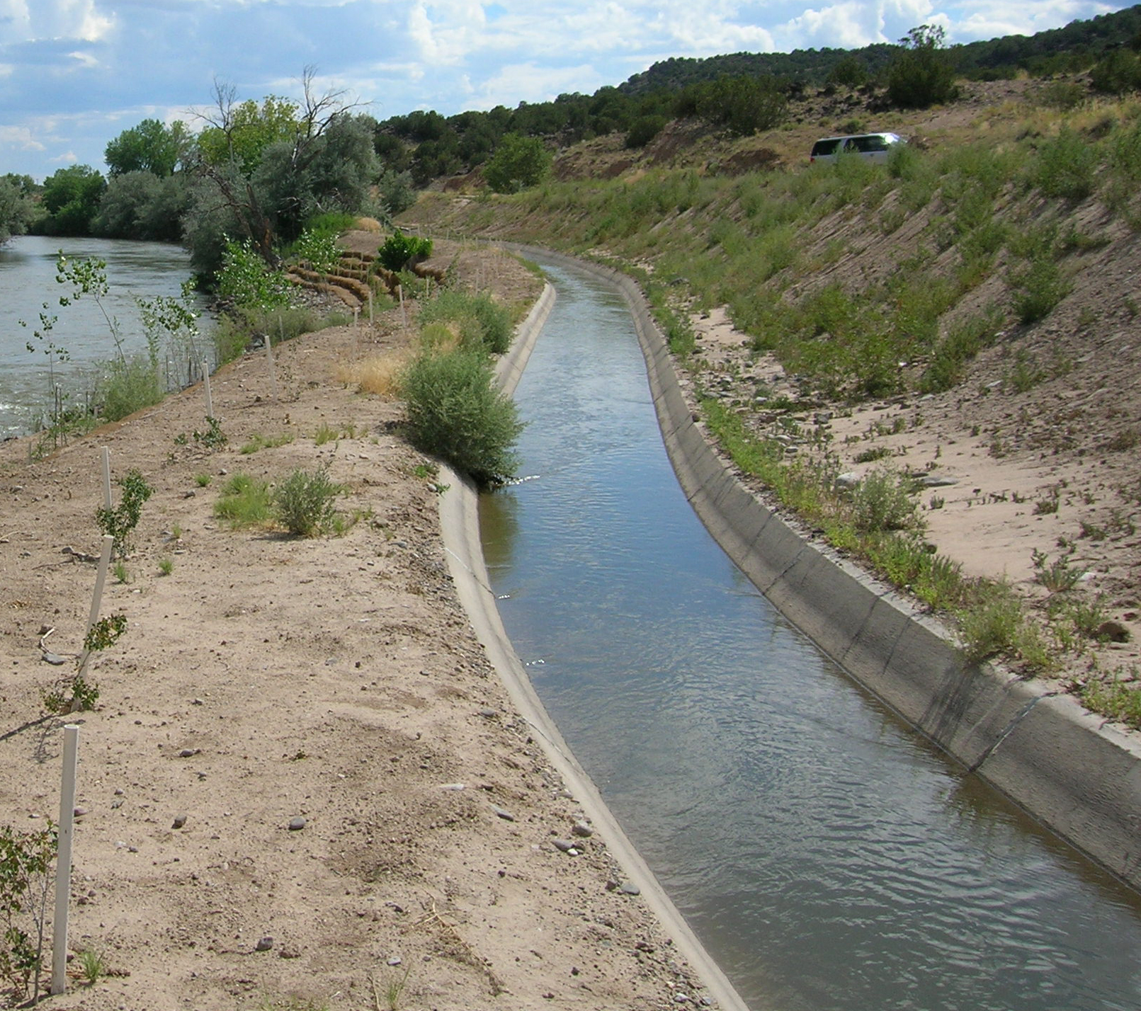 La Canova Acequia near Velarde, New Mexico